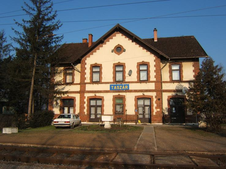 Taszár vasútállomás